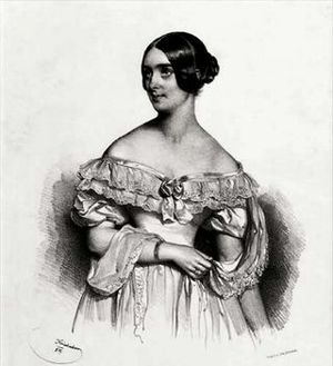 Marie Pleyel en Vienne